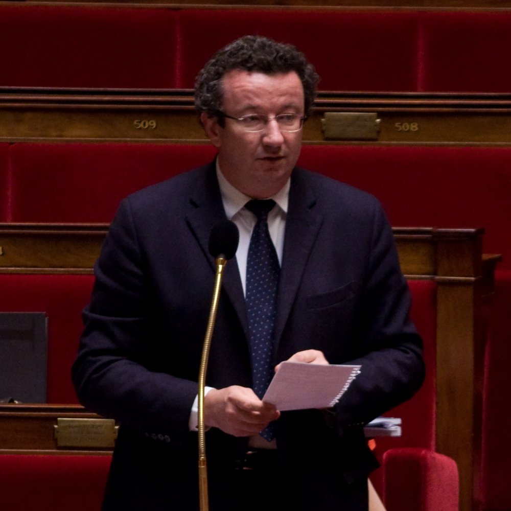 Christian Paul, député français, lors des débats sur la Loi Création et Internet. CC Richard Ying pour LePost.fr